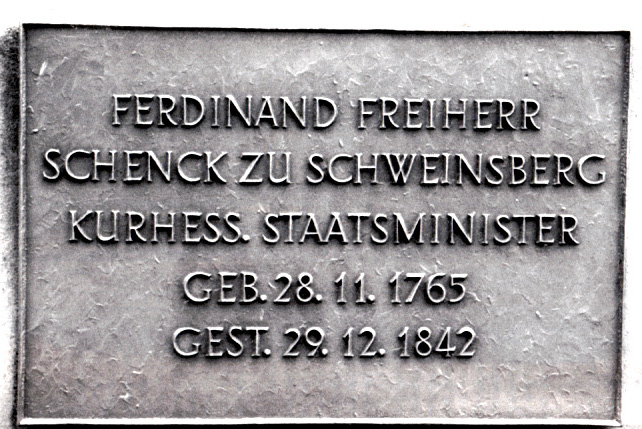 Gedencktafel für Frhrn. Ferdinand Schenck zu Schweinsberg auf dem Familienfriedhof der Schencken zu Schweinsberg in Schweinsberg